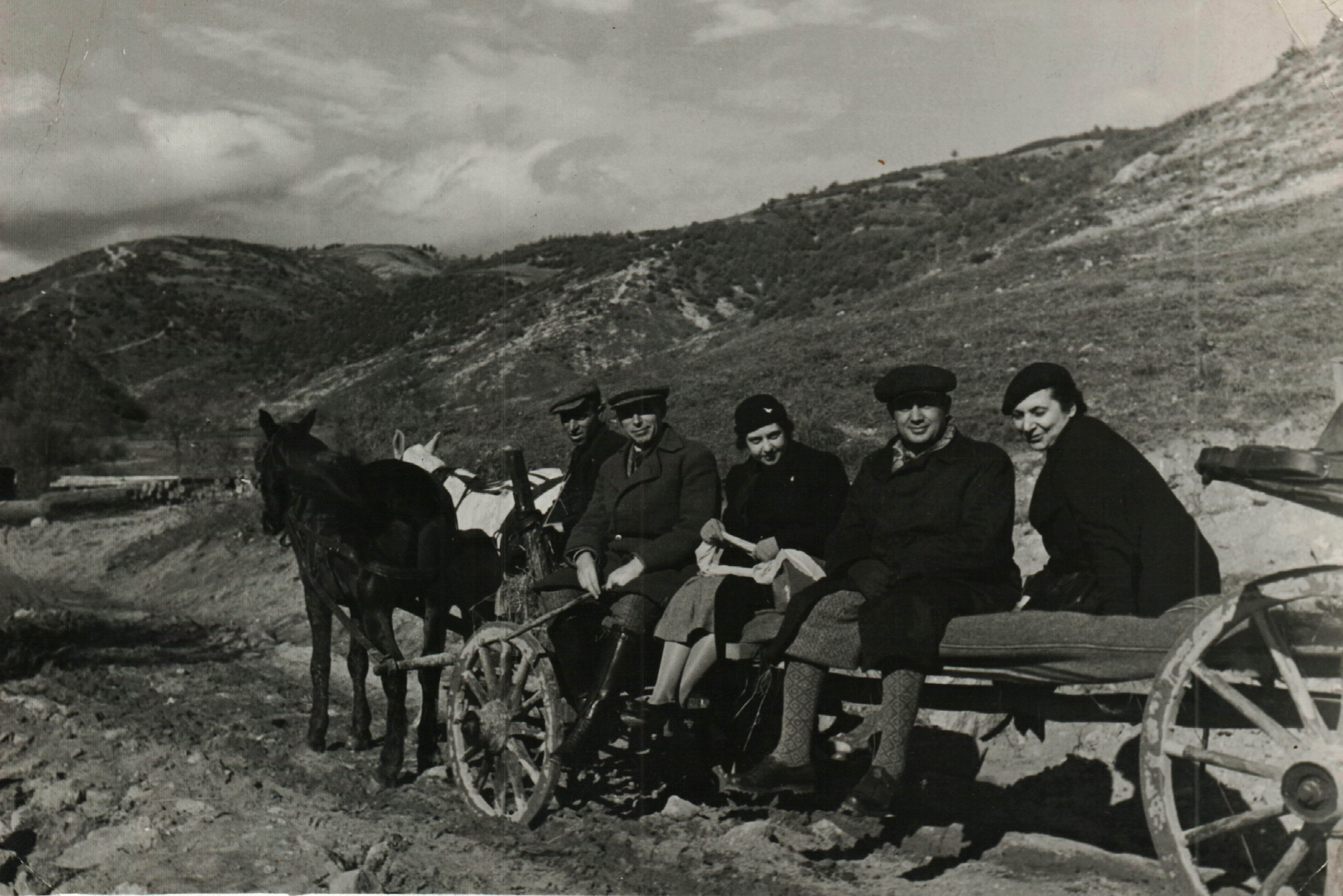 Инж. Стоян Митов в Родопите като секционен инженер на жп линията Септември – Велинград.